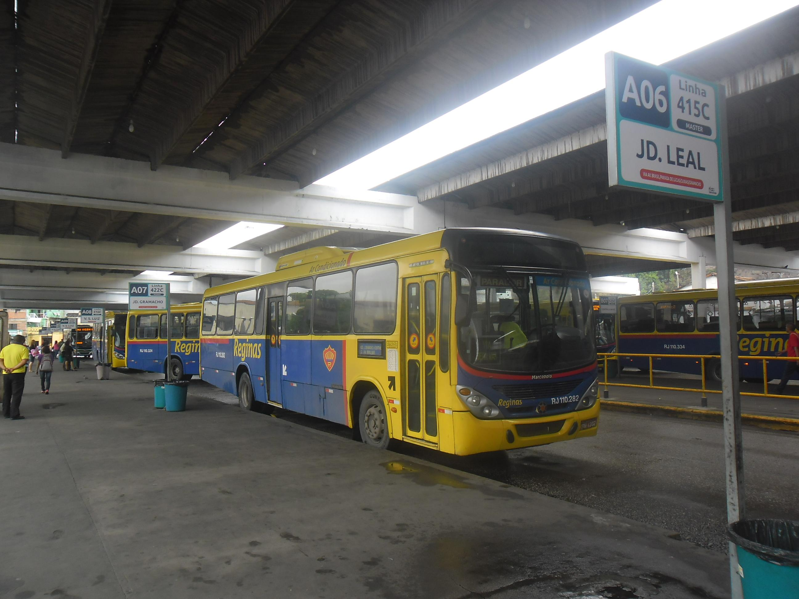 Auto Viação Reginas